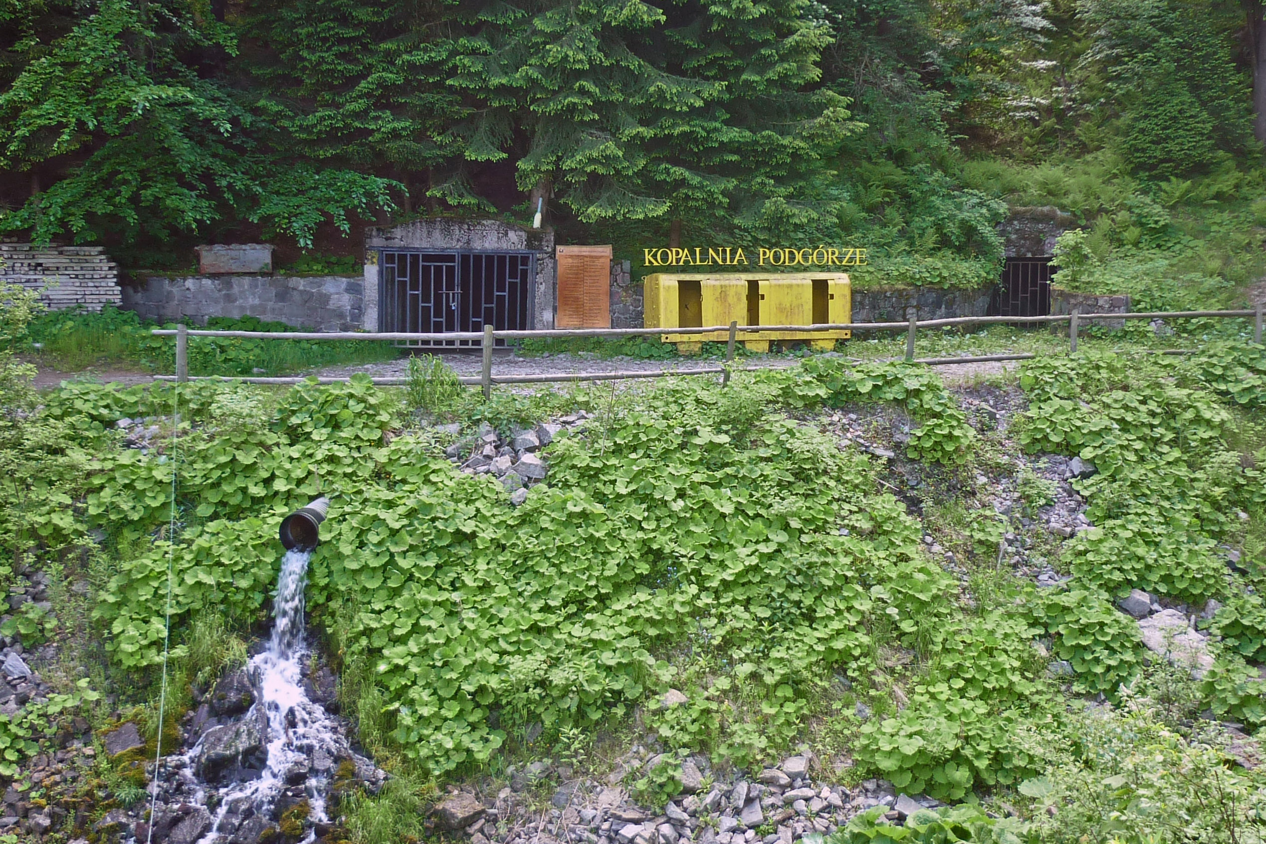 Ehemaliges Uran-Bergwerk in Arnsberg (Podgórze) in Ober Schmiedberg im Riesengebirge